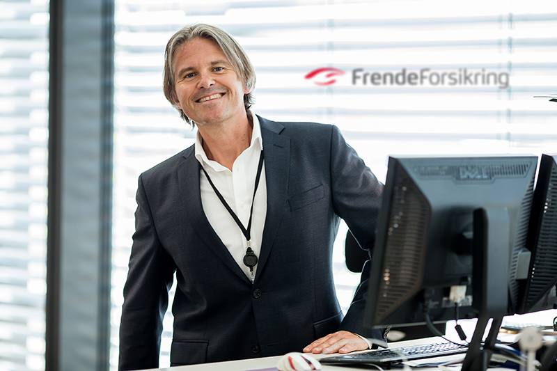 Vegar Styve er administrerende direktør i Frende.Depicted person: Vegar Styve